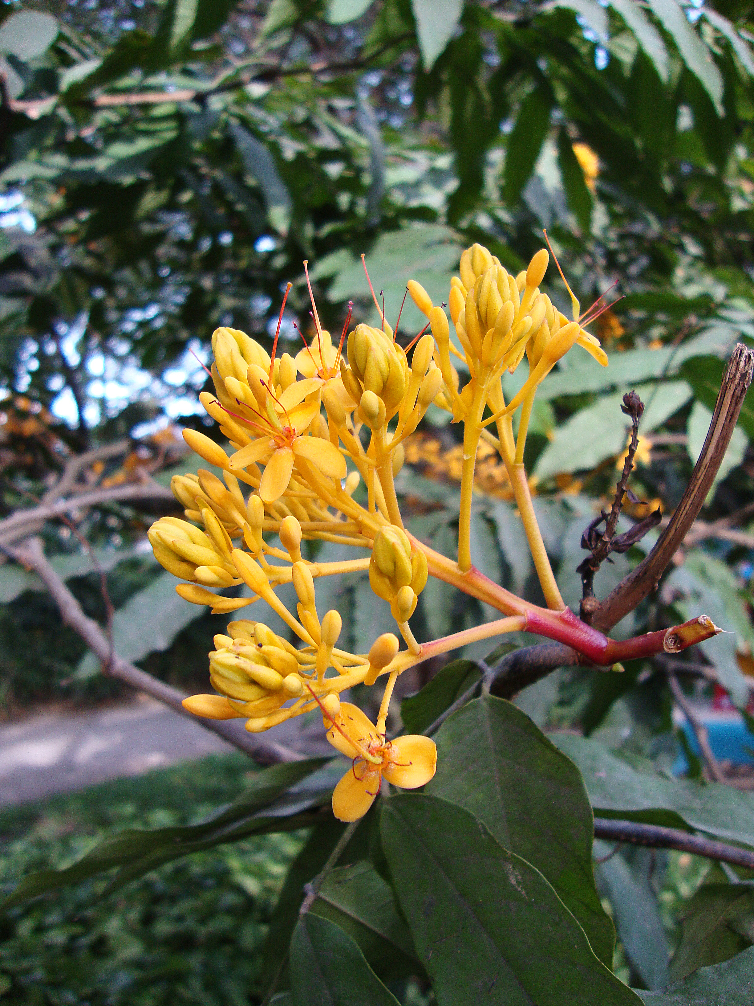 Saraca dives Pierre, 1899